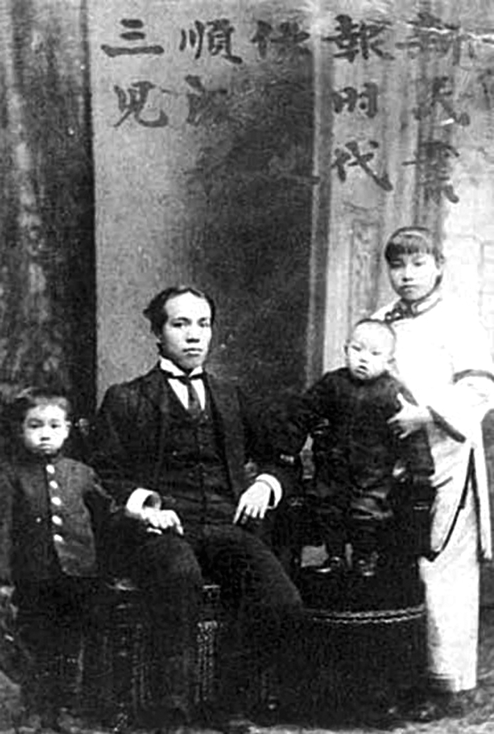 这是1905年，梁启超与长女思顺，二子思成，三子思永于日本东京合影。